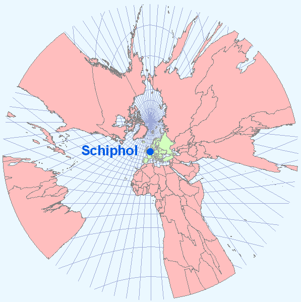 Weltkarte mit gnomonischer Projektion, Schiphol im Zentrum